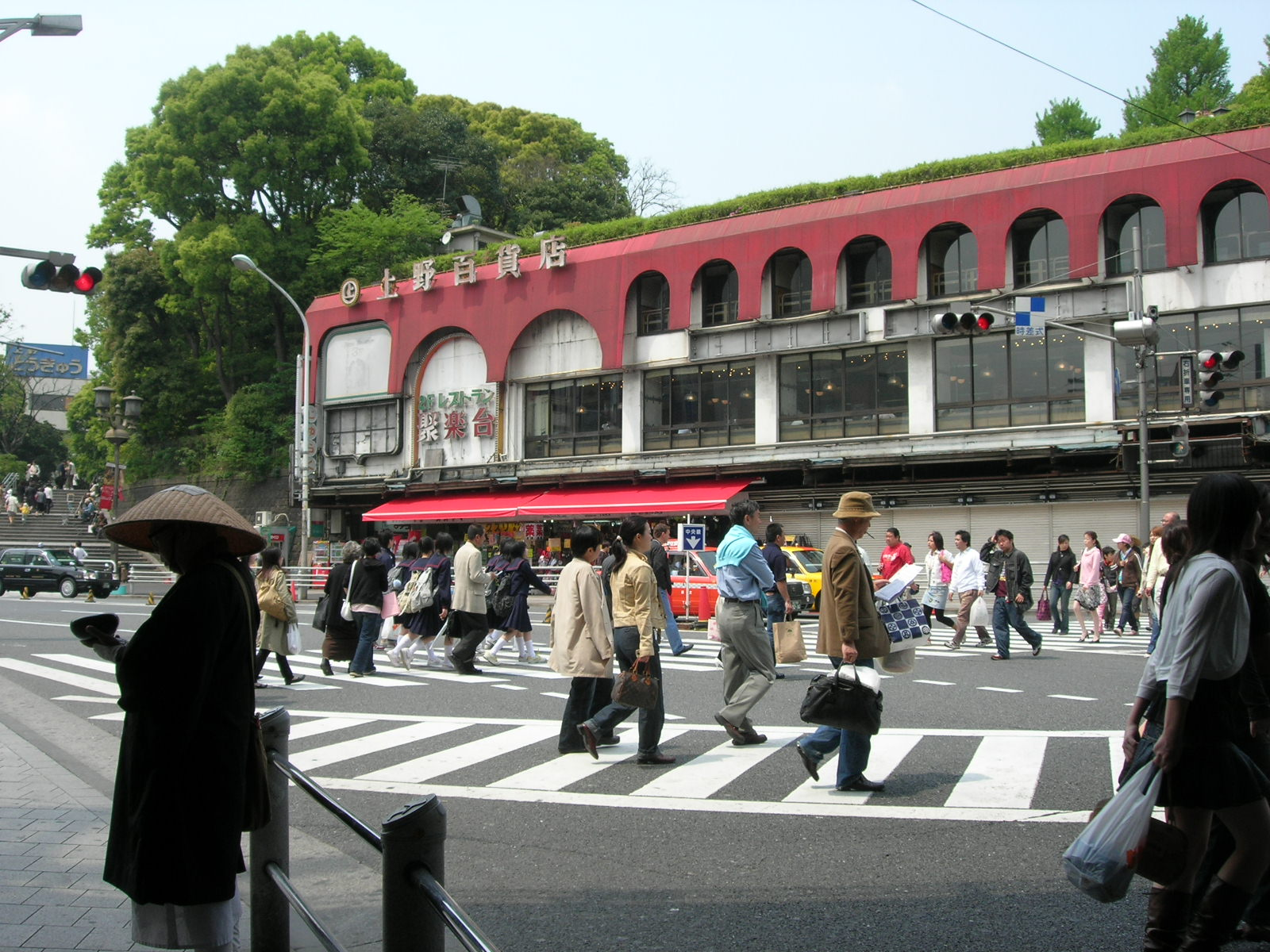 上野 聚楽